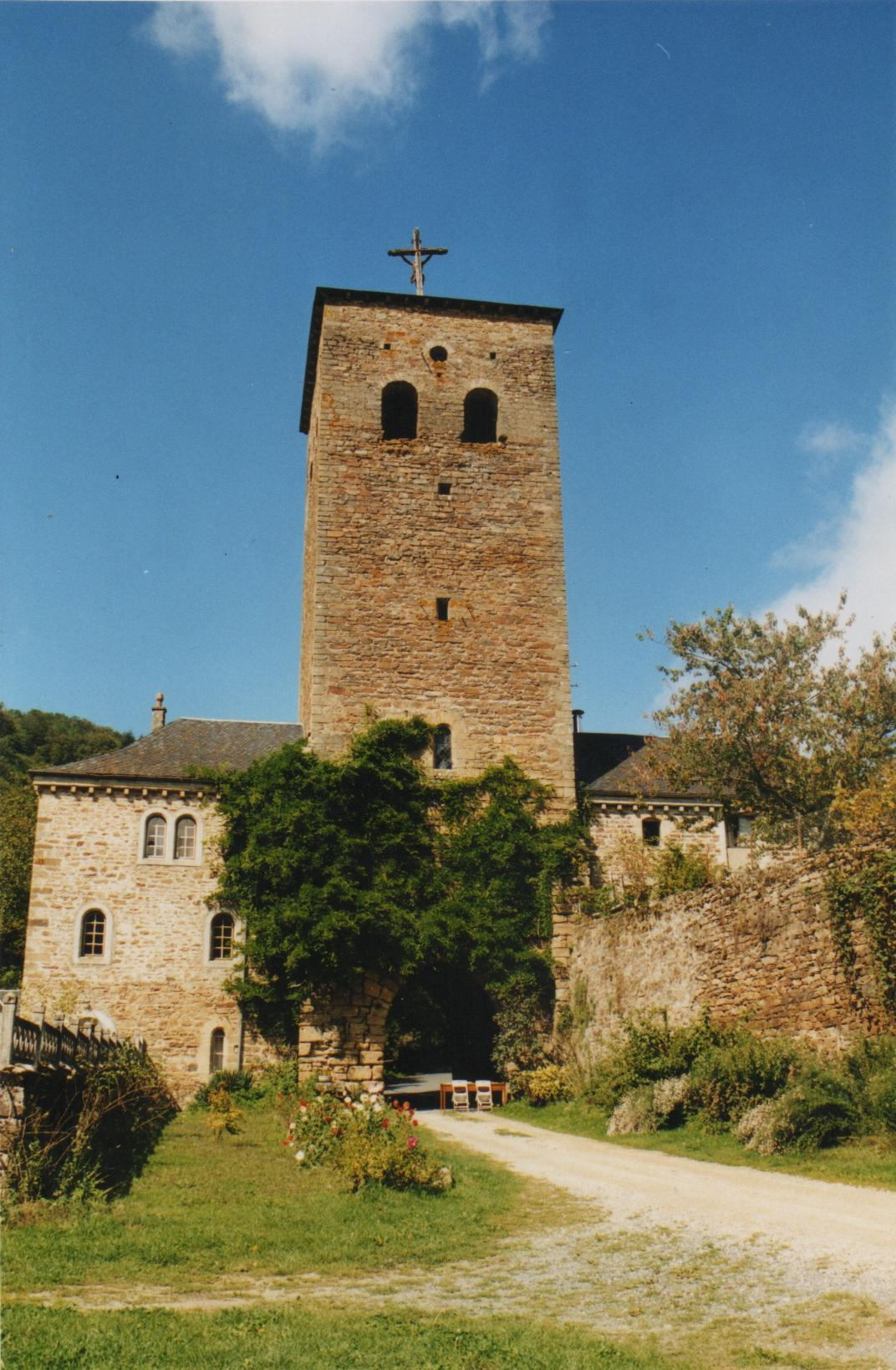 Tour Saint-Bernard, entrée de l'abbaye de Bonnecombe.